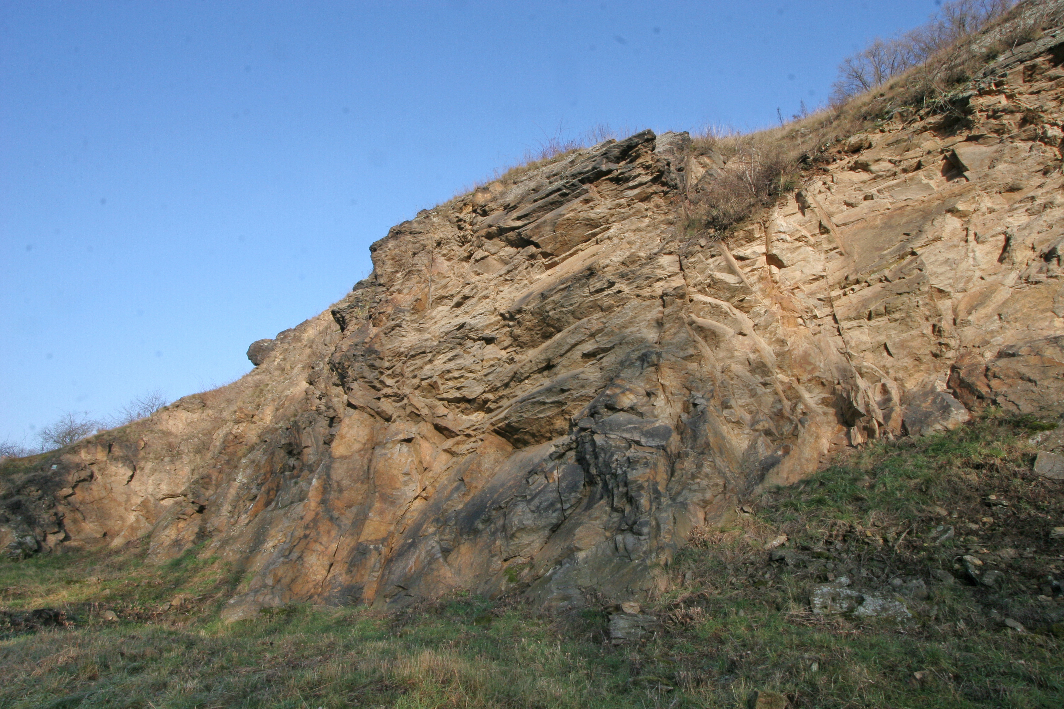 PP Stráně u splavu